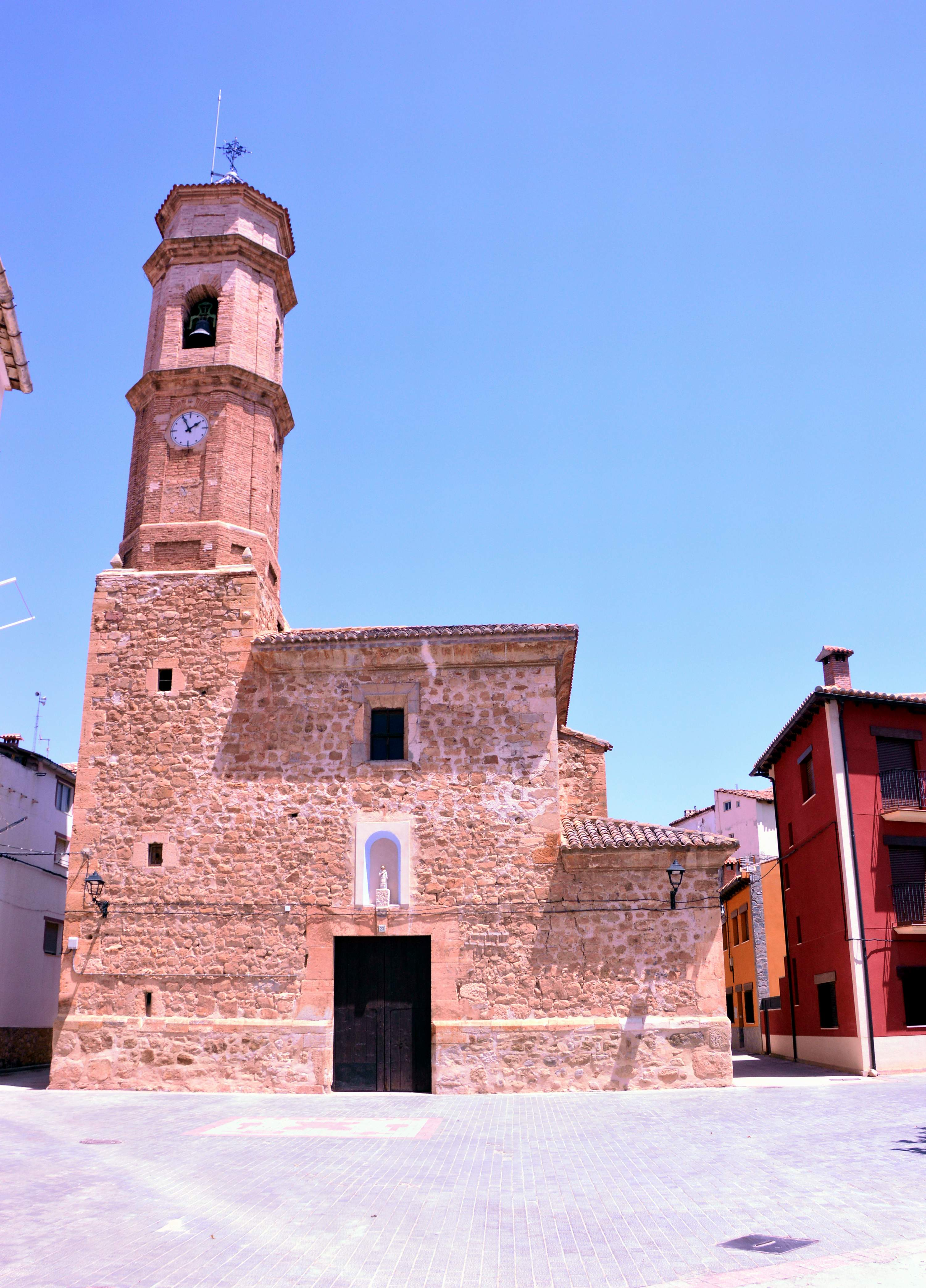 Vista frontal de la iglesia parroquial de Riodeva (Teruel), 2017.